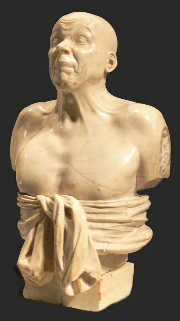 Franz Xaver Messerschmidt (1736–1783) Alternative names F. X. Messerschmidt; fr. x. messerschmidt; Messer Schmid; Messerschmidt; Franz-Xaver MesserschmidtDescriptionGerman-Austrian sculptorDate of birth/death 6 February 1736 19 August 1783Location of birth/death Wiesensteig, Bayern Pressburg